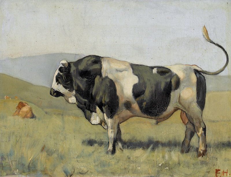 Freiburger Stier.